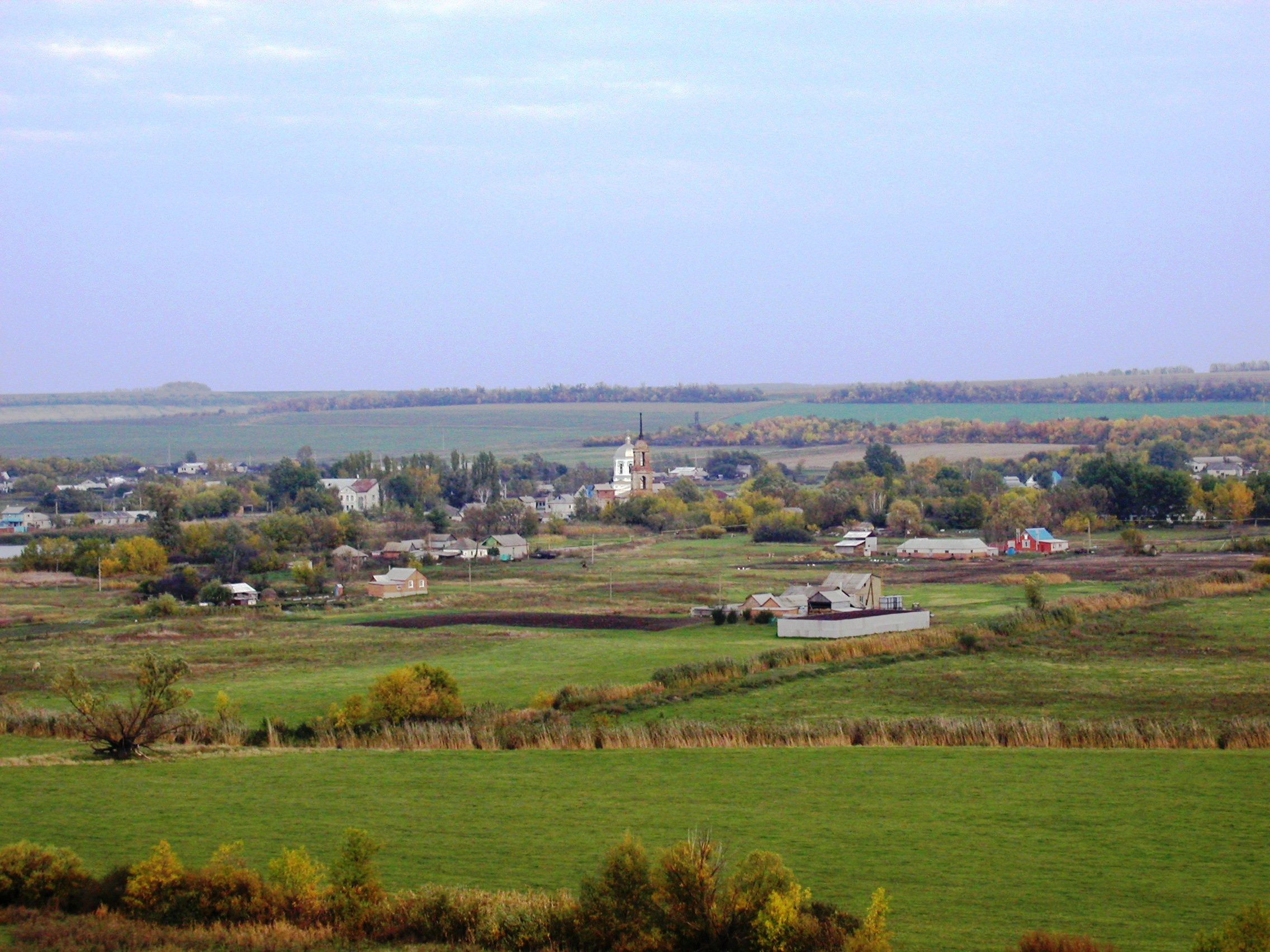 пейзаж_жилино